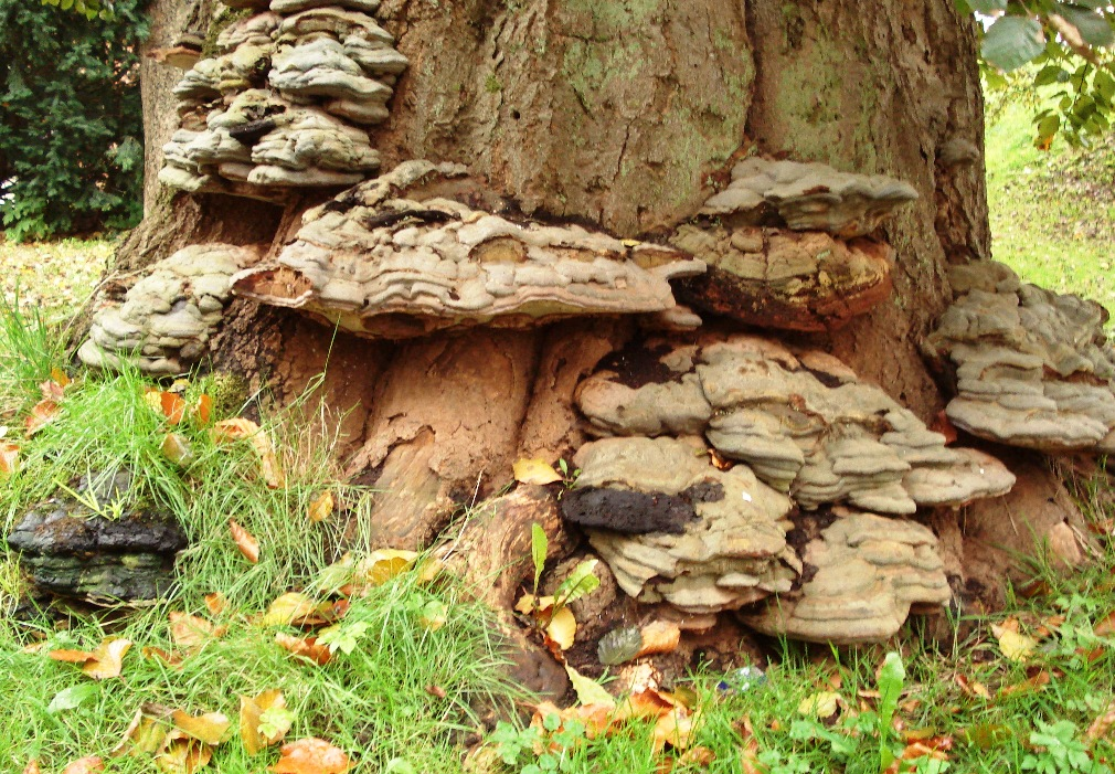 Bild des Pilzes Ganoderma_pfeifferi